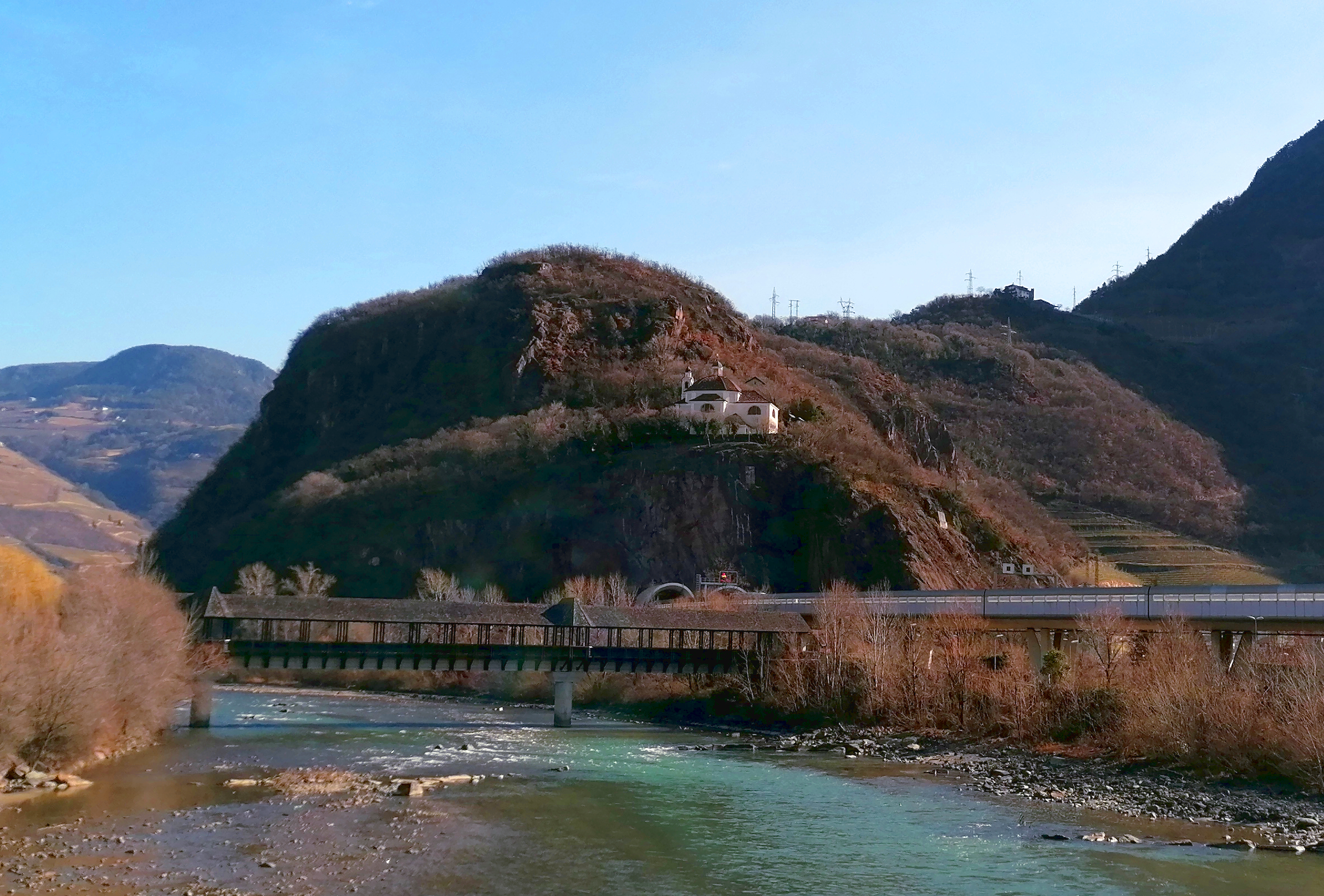 Il Virgolo e il Calvario (con la chiesa del Santo Sepolcro) visti da sud-ovest